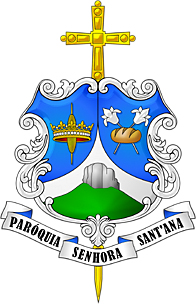 Brasao da Paroquia